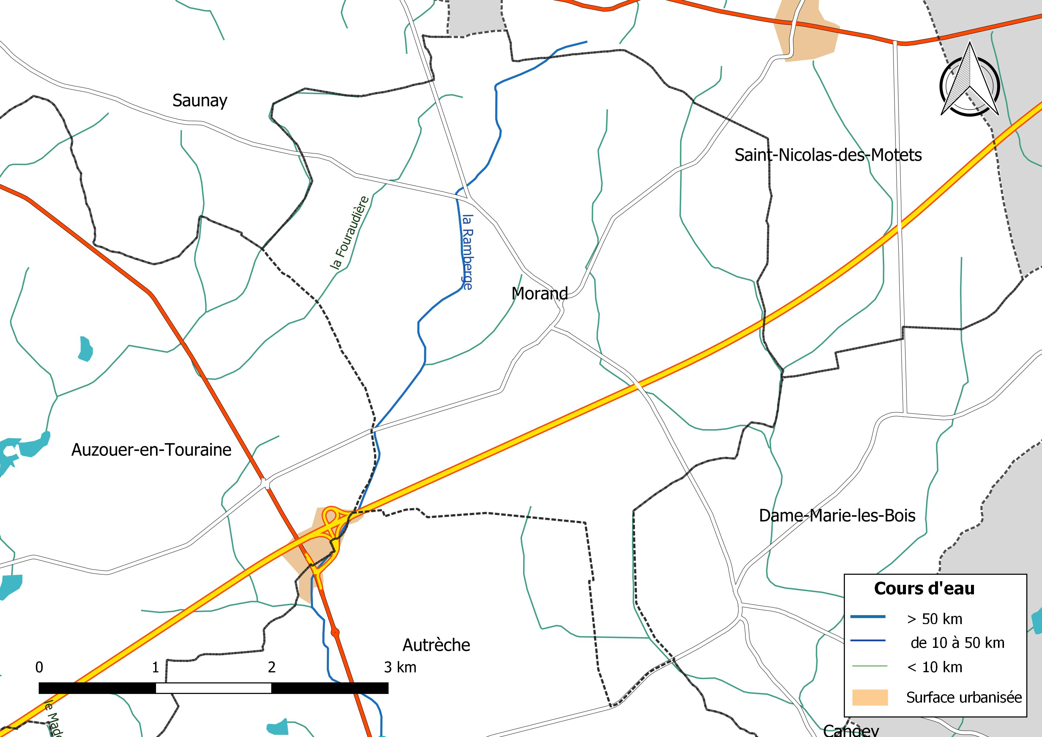 Carte du réseau hydrographique de la commune de Morand (France).